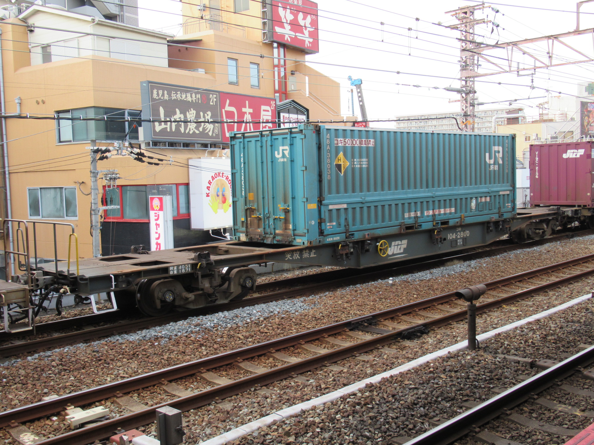 コキ104-2800 西九条駅。積載コンテナは、48A-38038 (JR貨物所有)